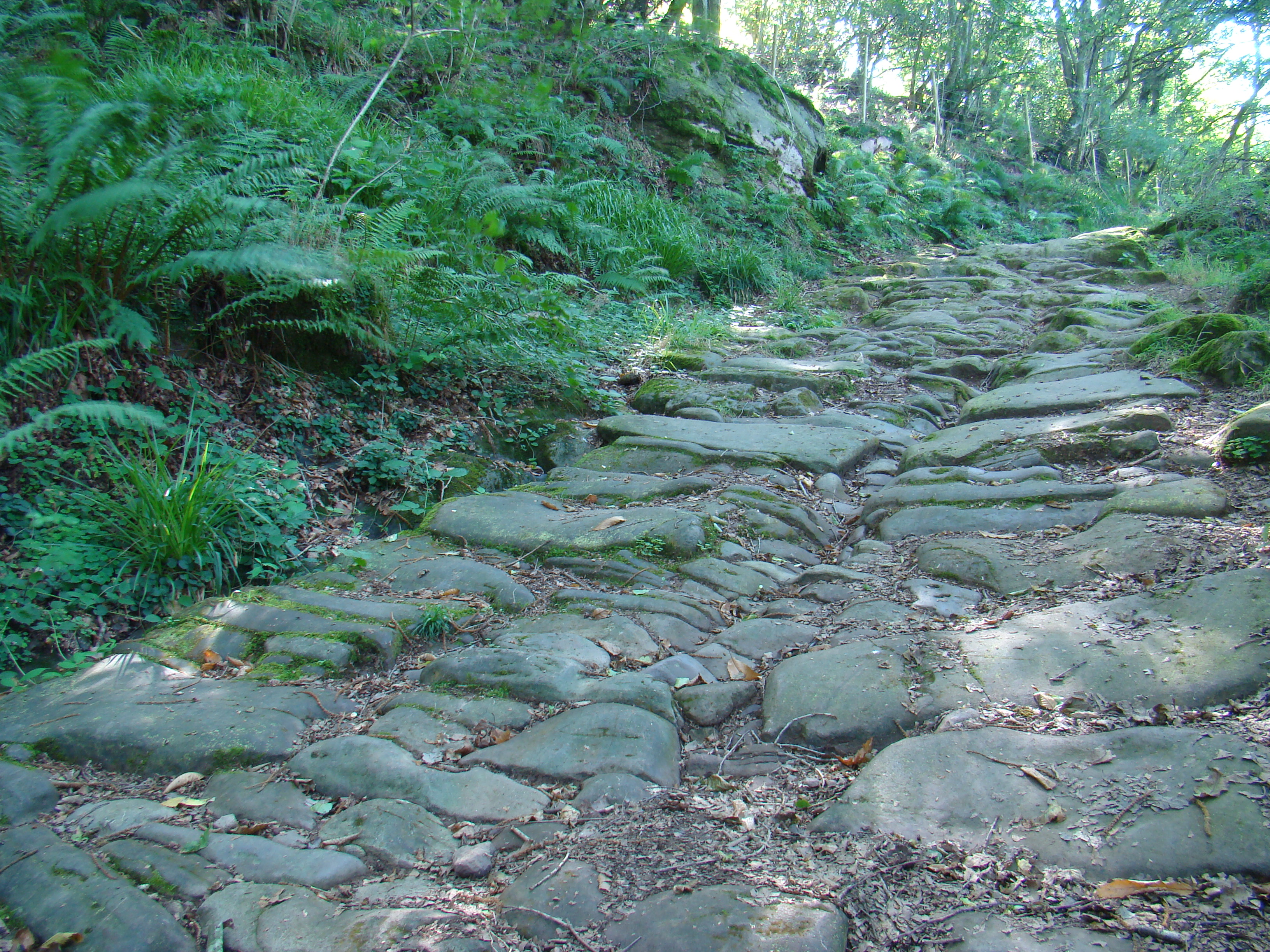 La calzada romana del valle del Besaya o Calzada de los Blendios (Cantabria, España) pertenece a la Via Legione VII Gemina Ad Portum Bledium, cuyo itinerario aparece en la placa I del Itinerario de Barro. Se inicia cerca del lugar llamado Somaconcha.